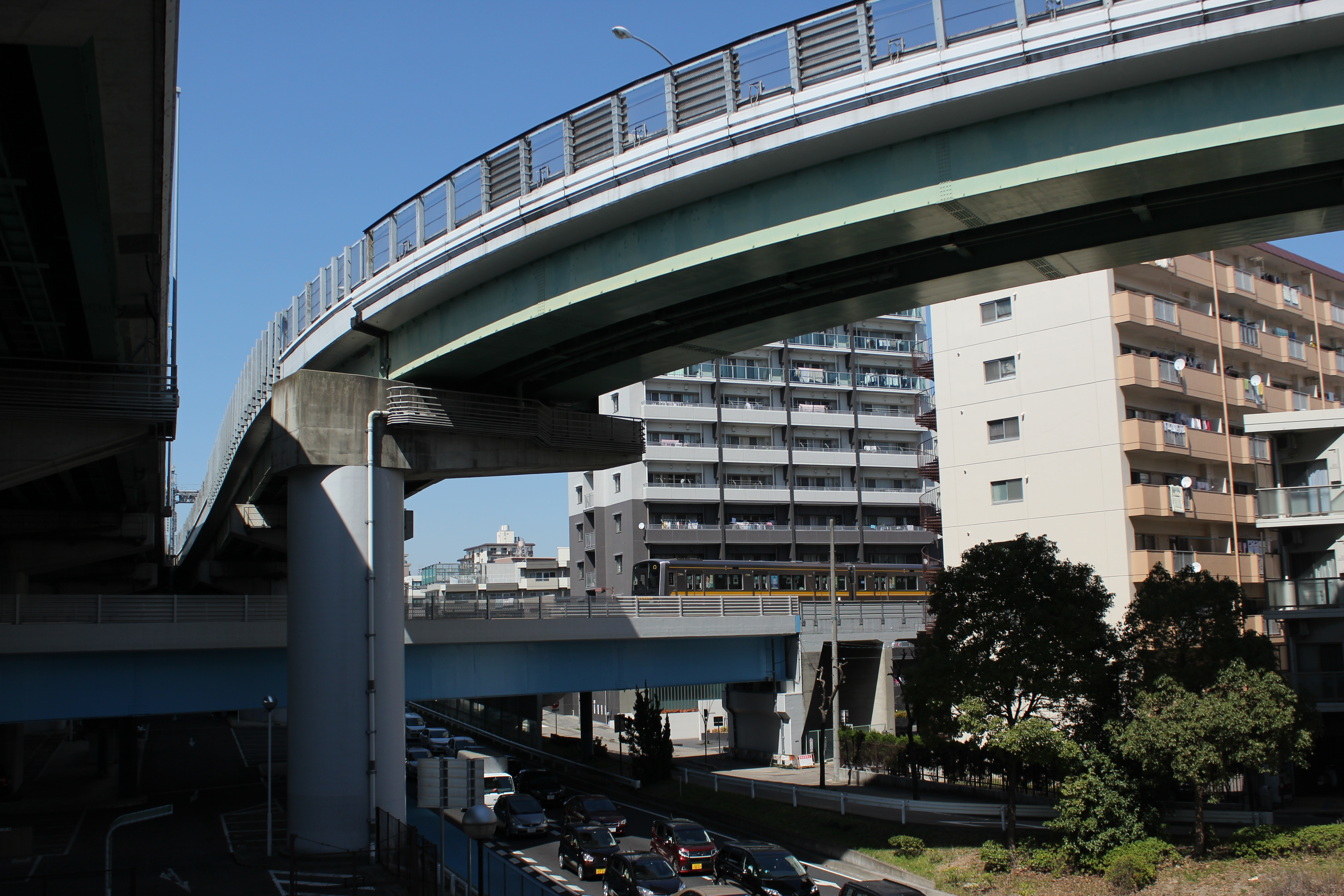 名古屋市営地下鉄東山線上社付近